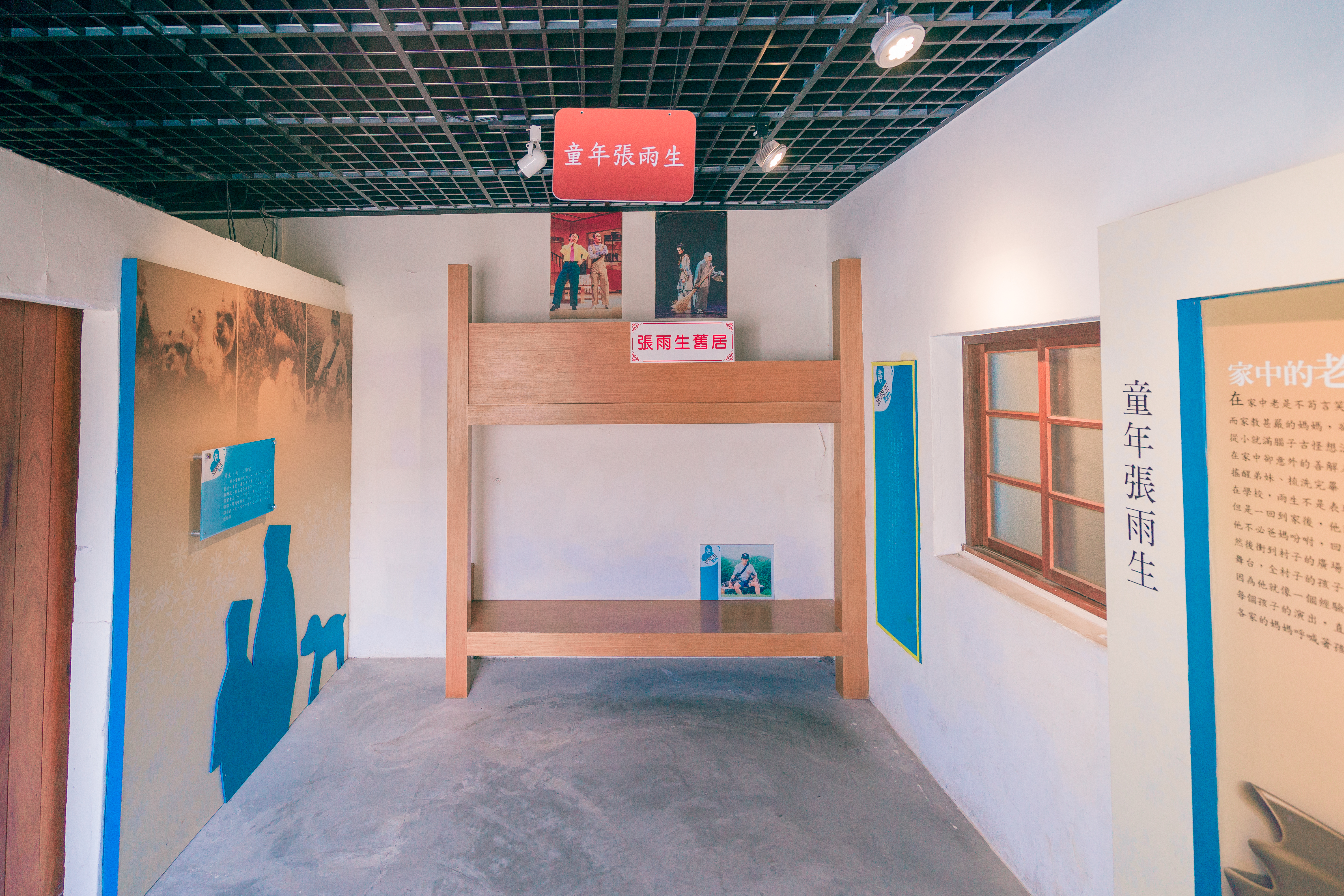 張雨生紀念館童年張雨生展區。